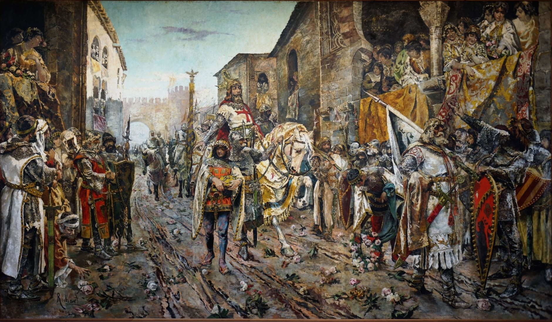 La obra representa la entrada triunfal del rey Jaime I de Aragón en la ciudad de Valencia, que conquistó a los musulmanes en 1238.